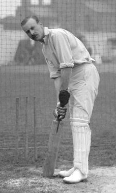 Frederick Fane, Essex